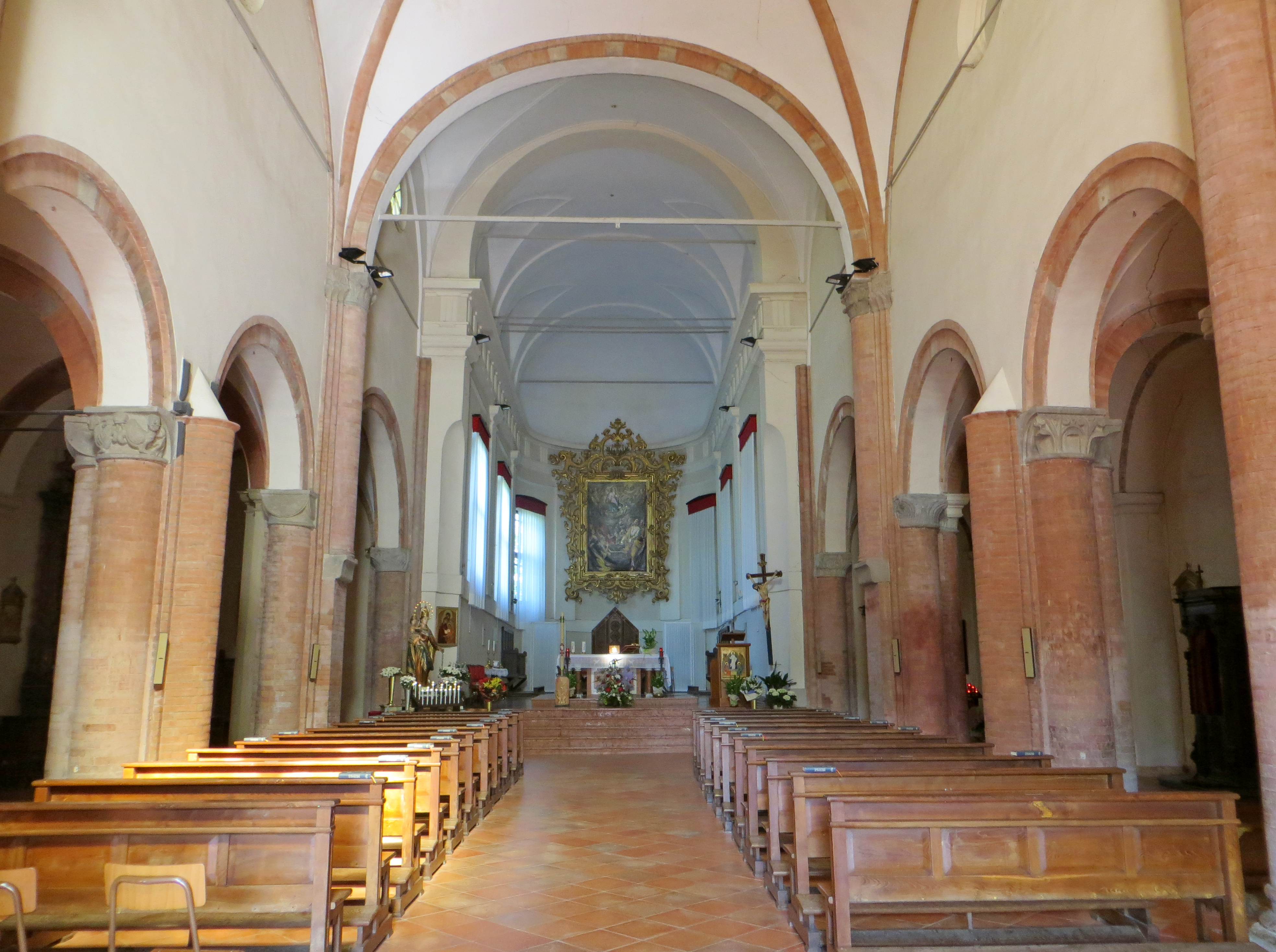 Monastero di Santa Maria Assunta (Castione Marchesi, Fidenza) - navata centrale